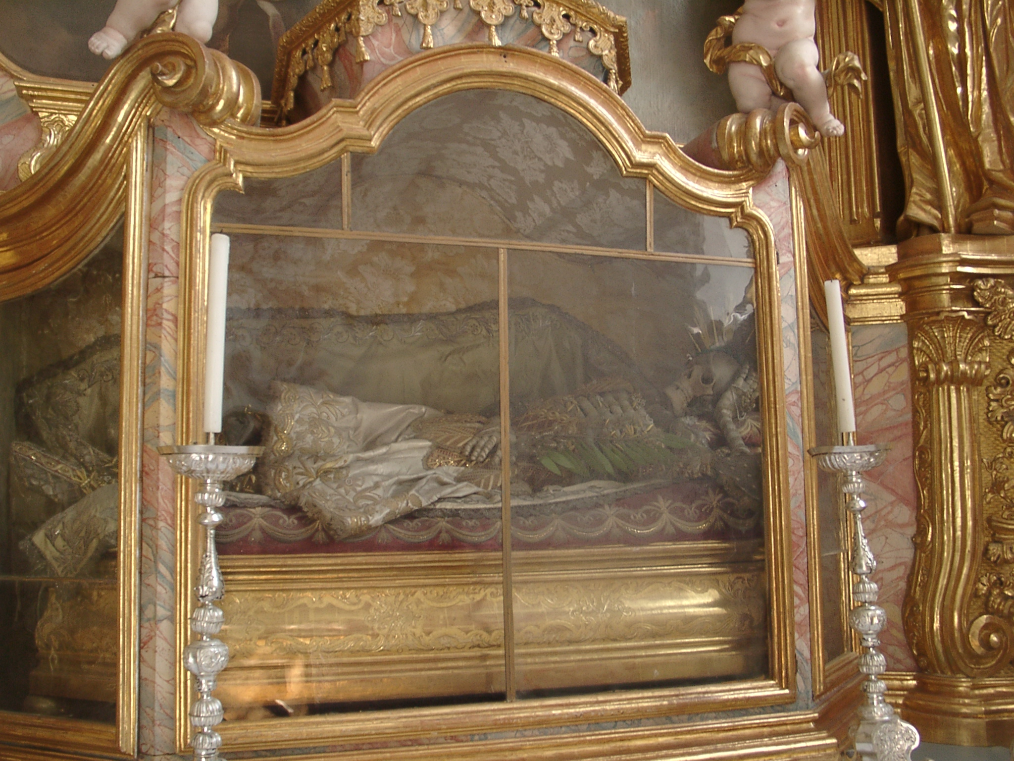 Stift Stams, Inneres